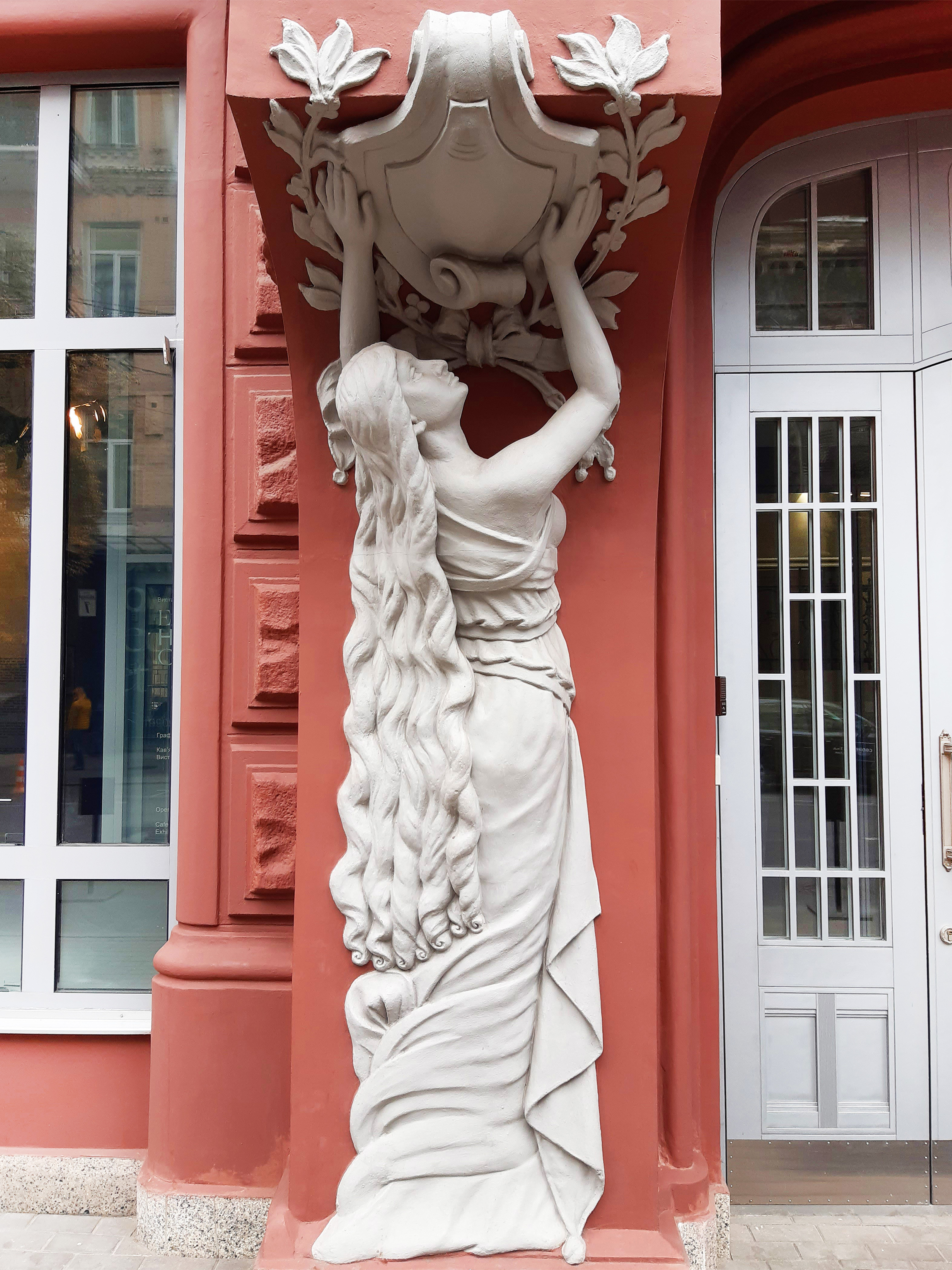 Каріатида на прибутковому будинку. Київ, Ярославів Вал, 14-а